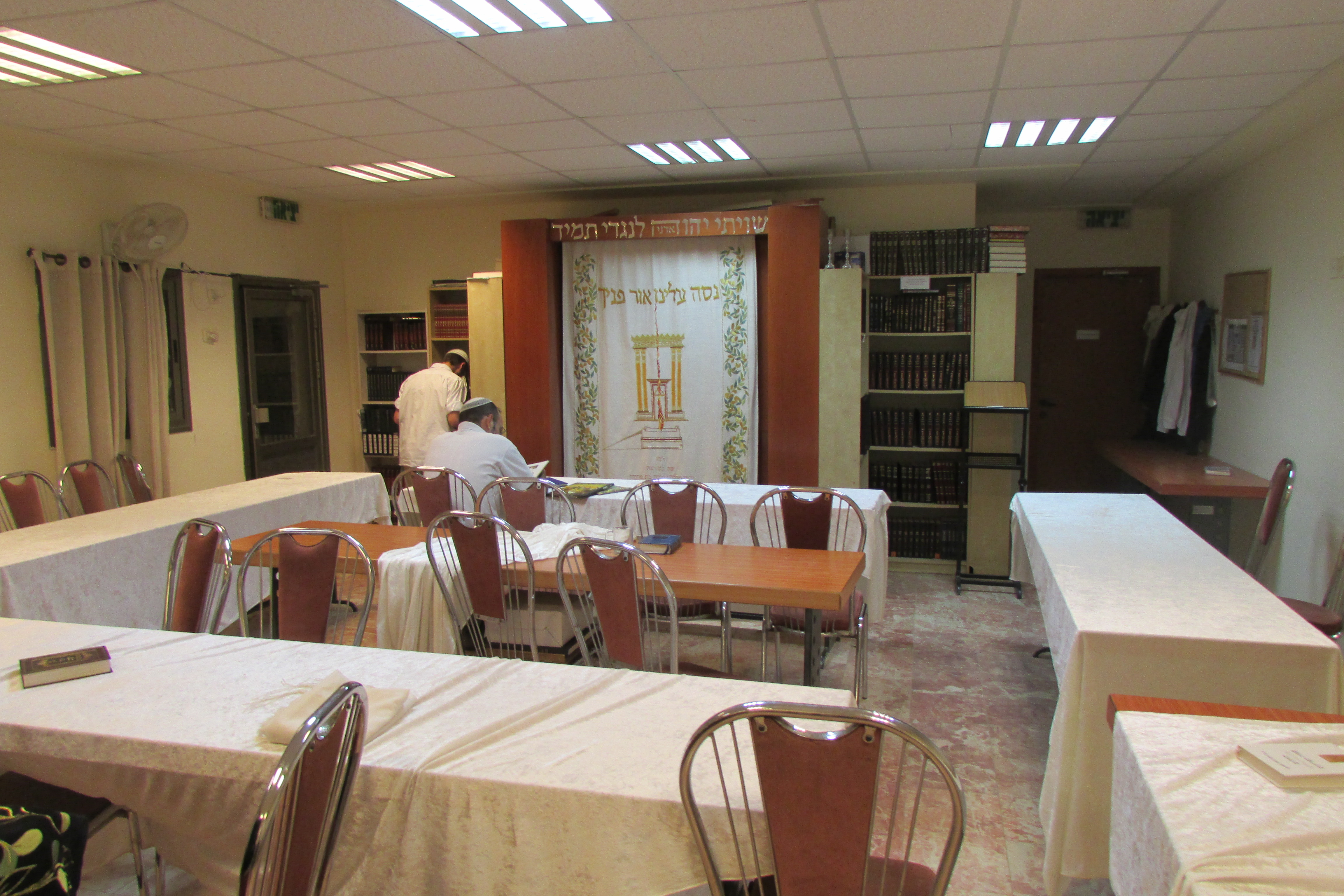 Sephardi synagogue in Yitzhar